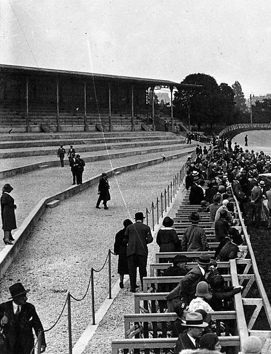 Vue générale du premier Parc des Princes et de ses premières tribunes, 1930 (date d'édition)